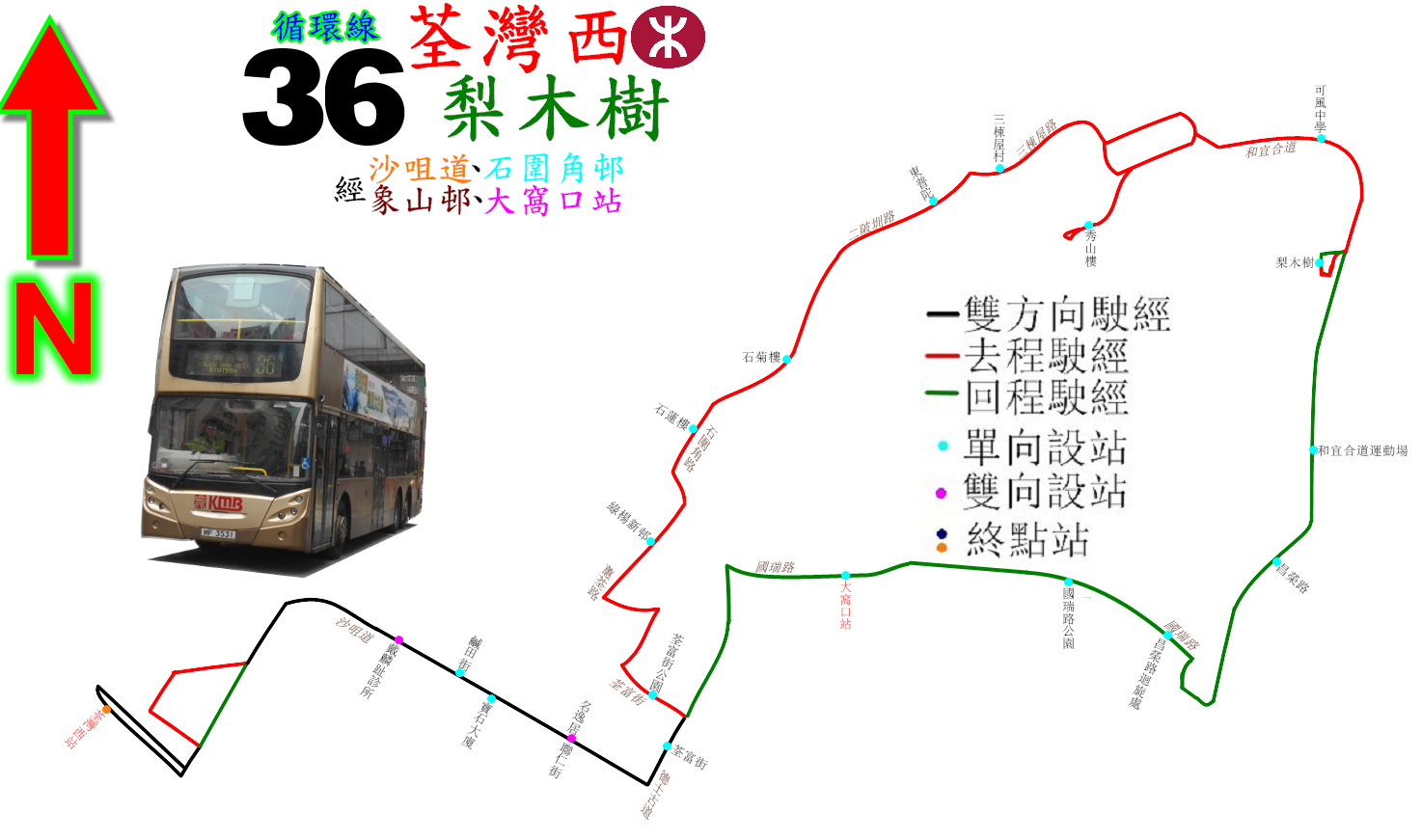 中文（香港）: 九巴36線(改線後)的走線圖